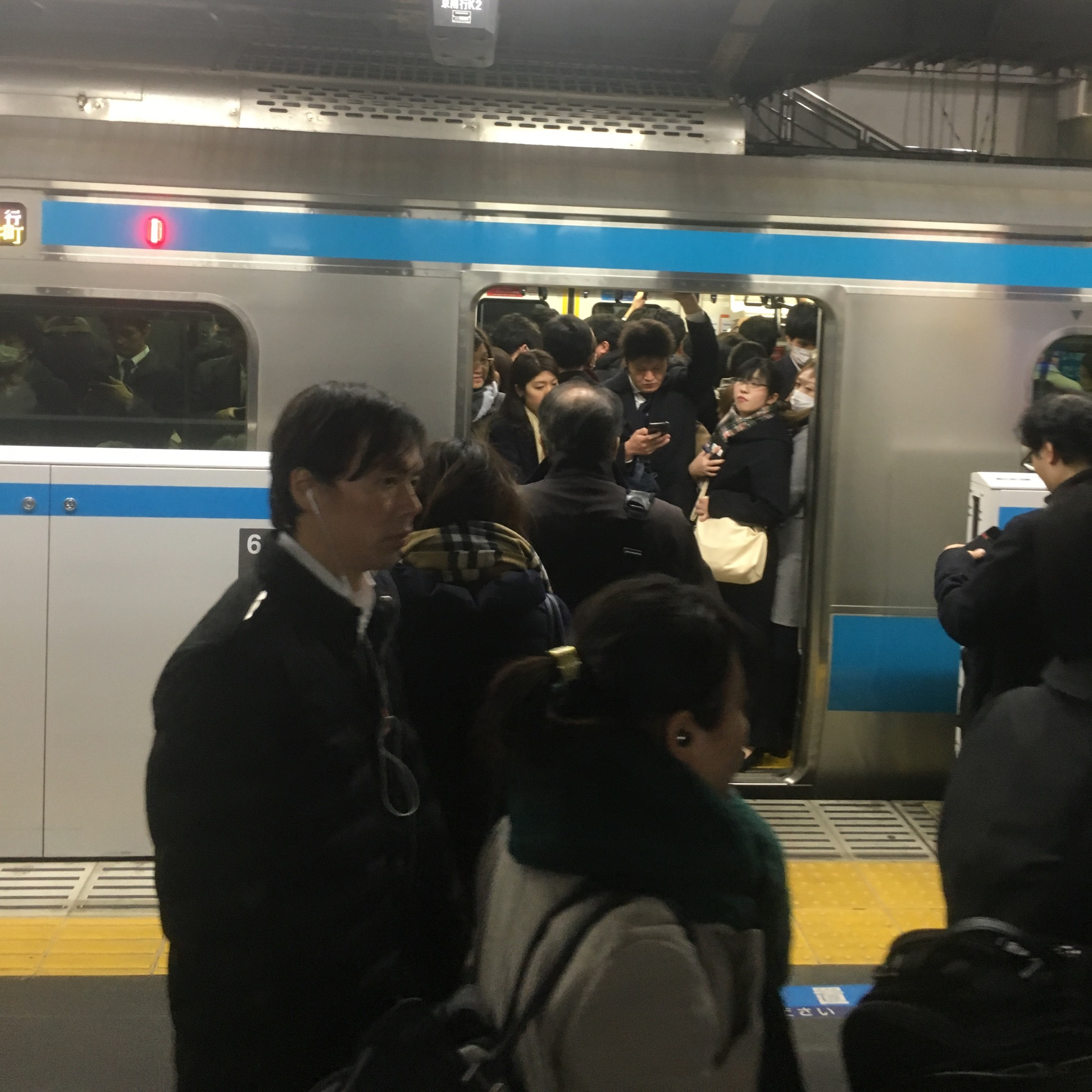 東京のラッシュ (Tokyo rush hour)